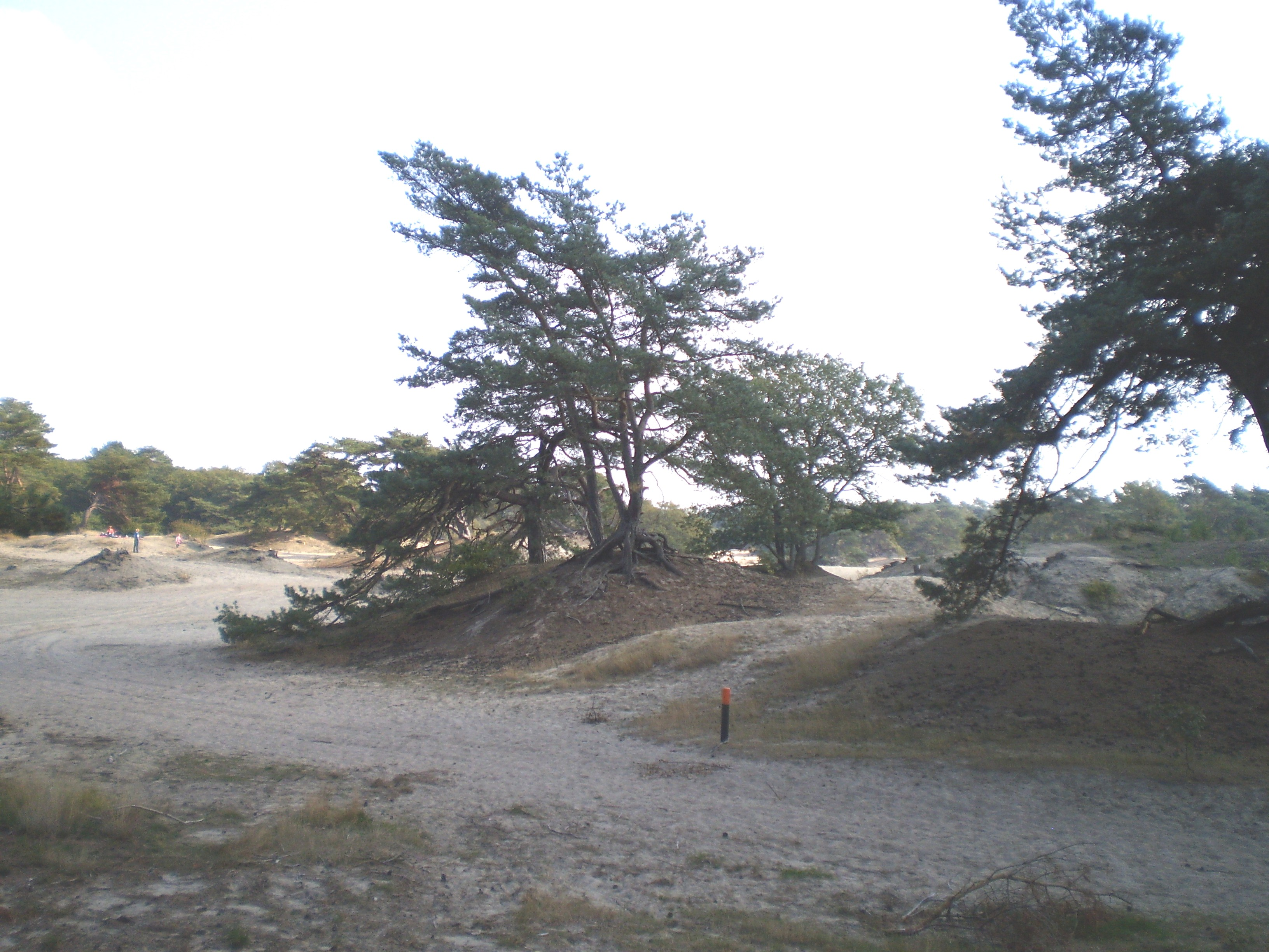 Soester Dunen